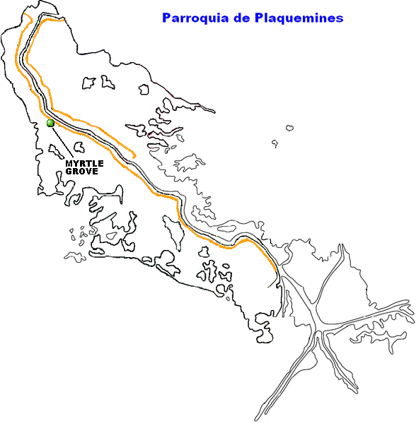 Myrtle Grove, Louisiana.